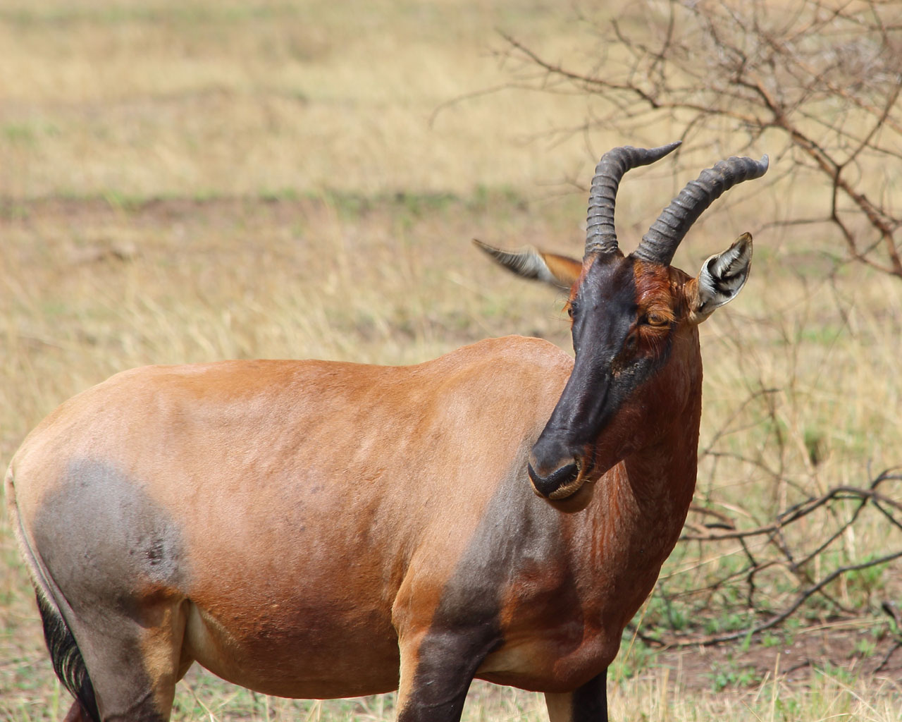 Topi, Serengeti (Tanzanie)